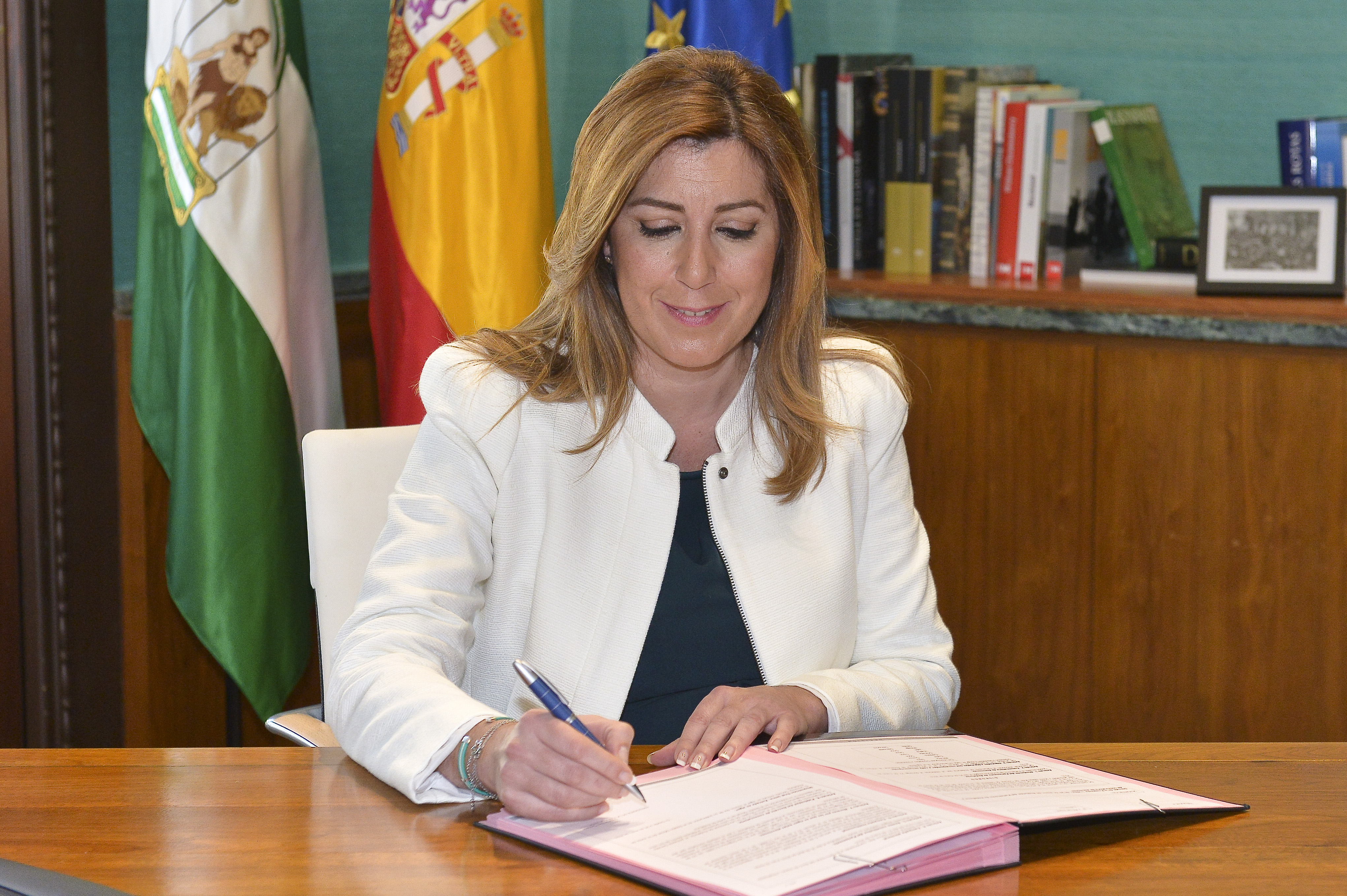 15.01.26-Firma-4-disolución Legislatura